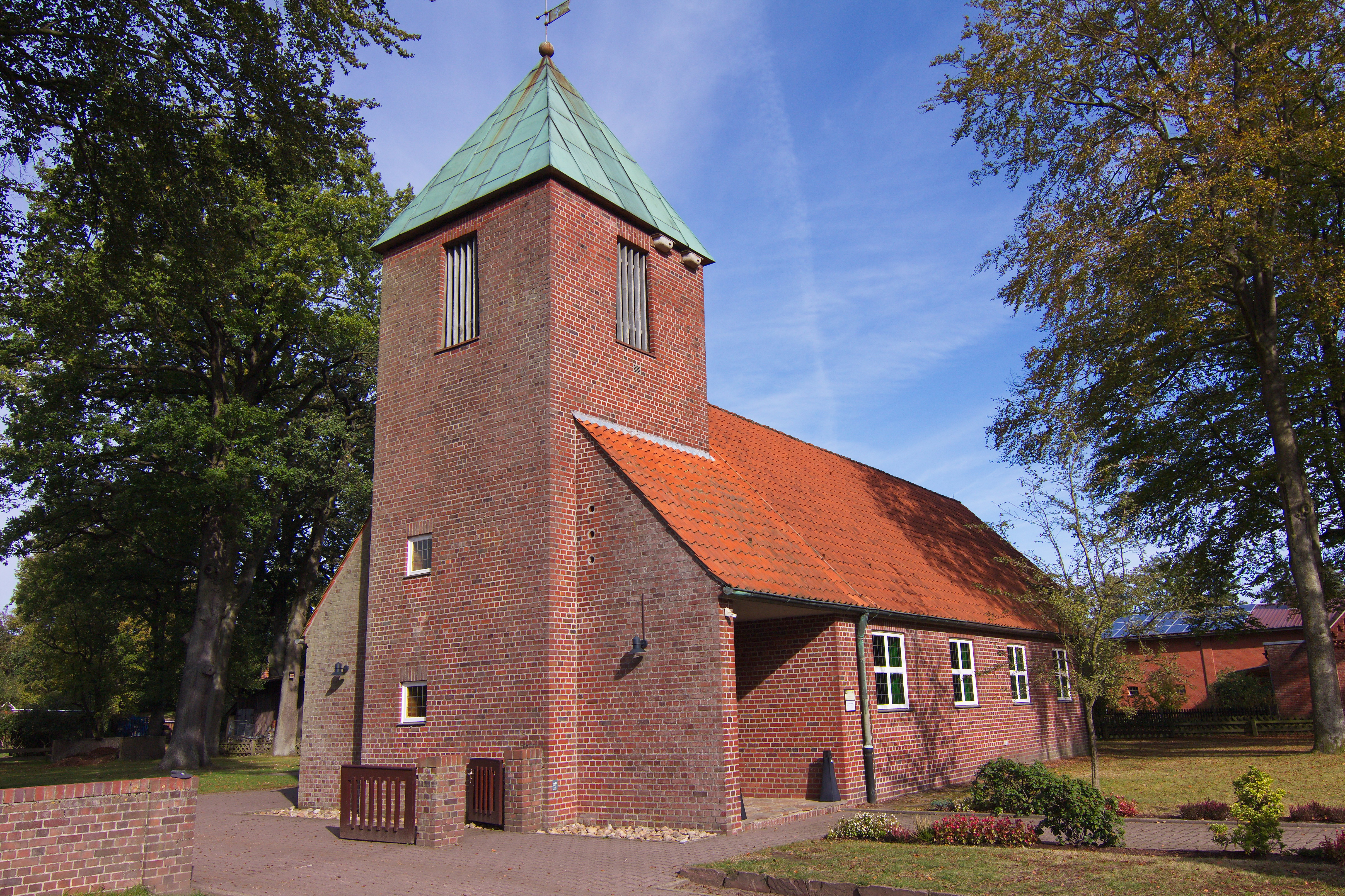 Friedenskirche in Heber (Schneverdingen), Niedersachsen, Deutschland